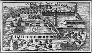 Kupferstich des Klosters aus dem "Churbaierischen Atlas"